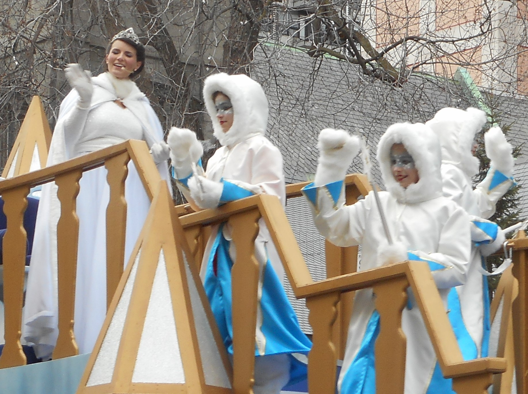 Défilé du Père Noël, rue Sainte-Catherine Ouest, Montréal Marie-Ève Janvier incarne la fée des étoiles.